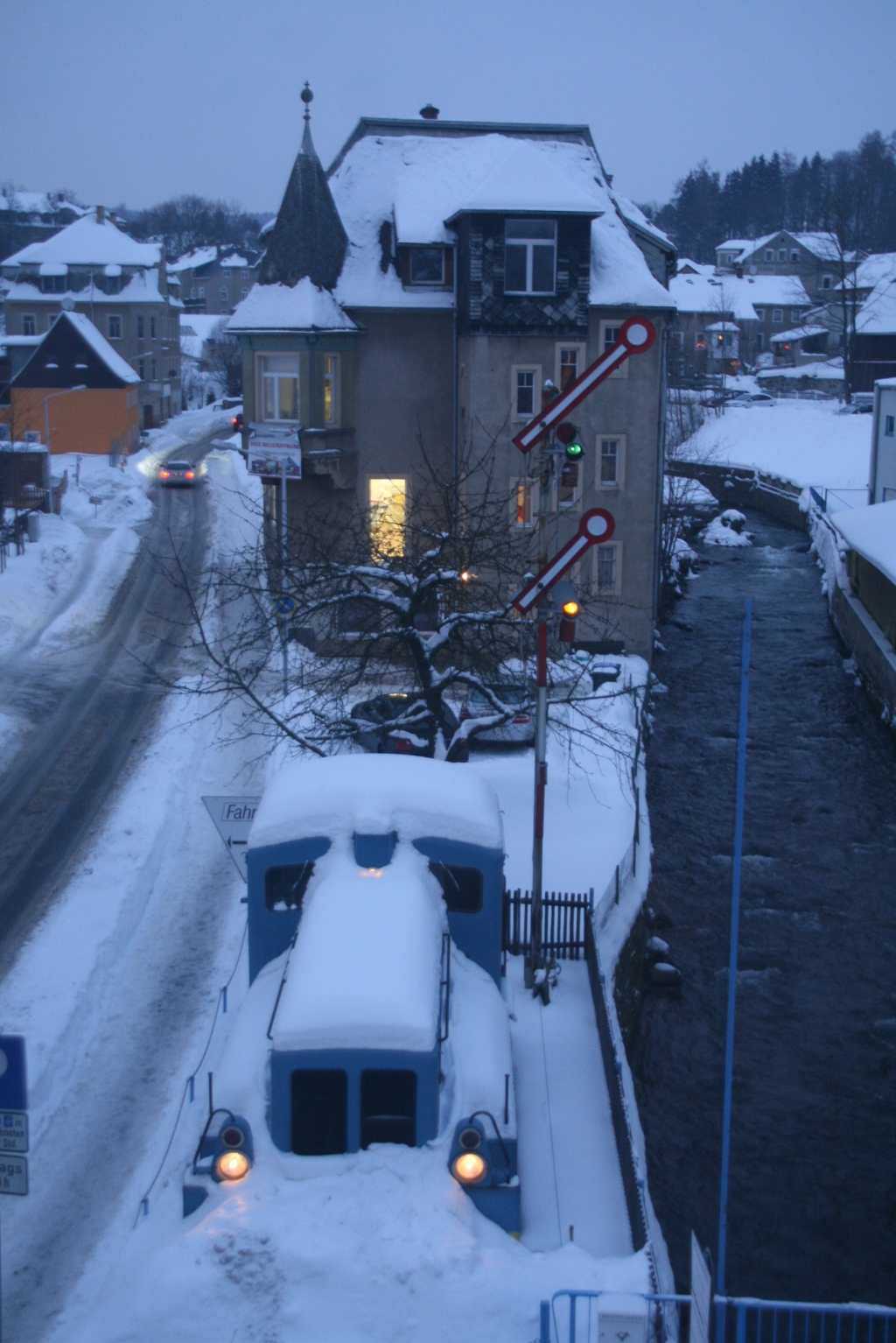 Tillig by Niederkasseler